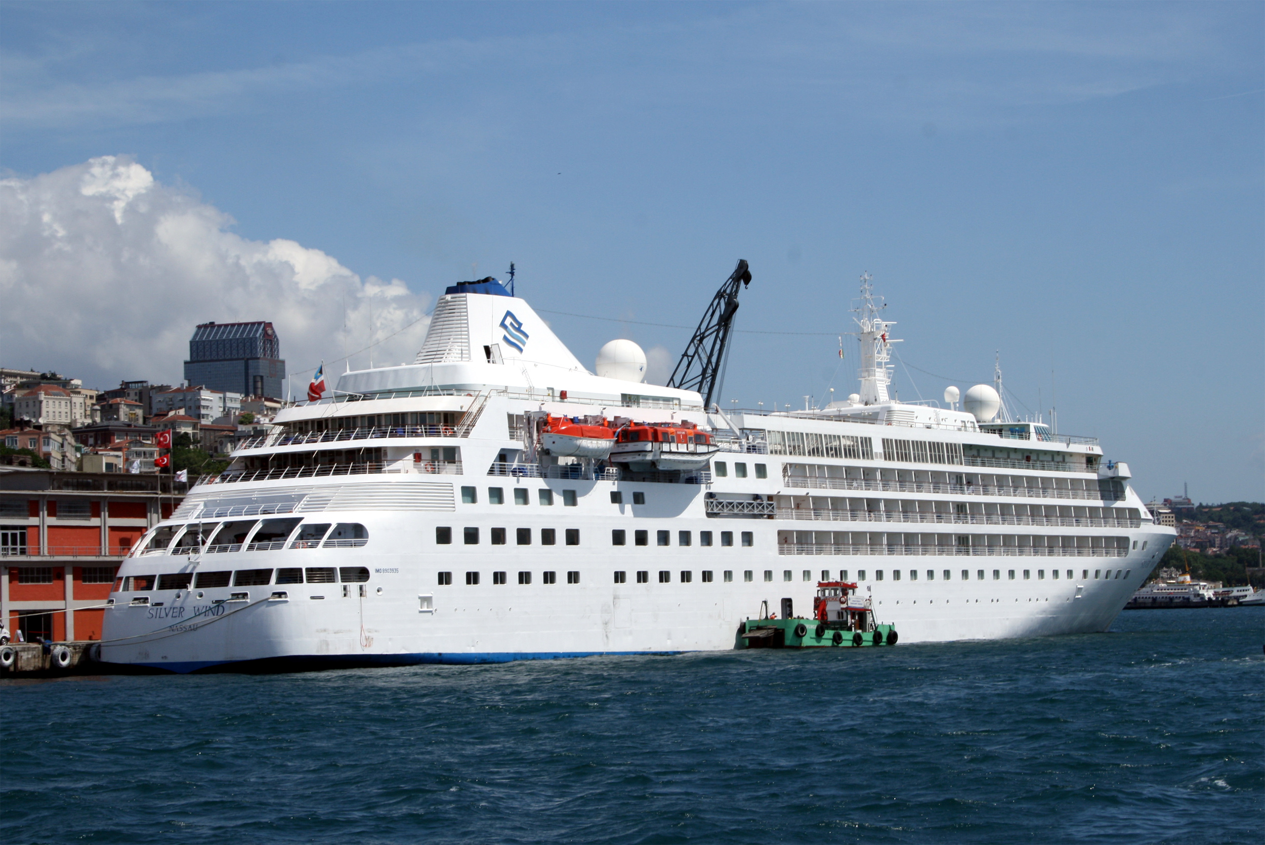 Le Silver Wind à quai à Istamboul